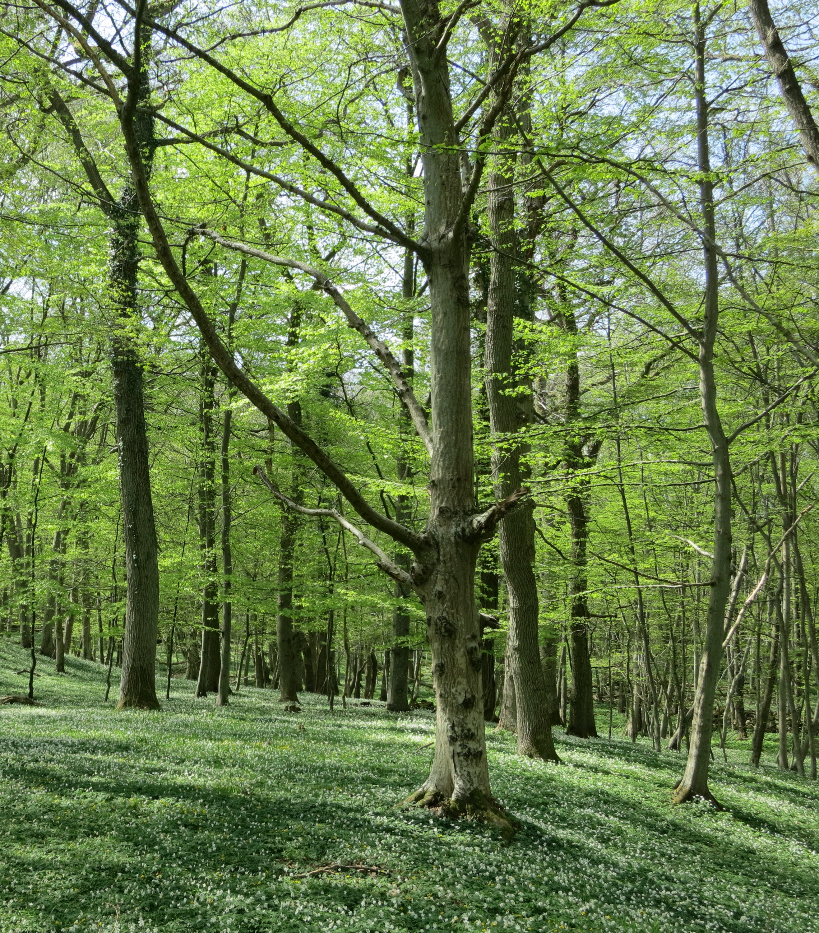 Nyutslagen bokskog i Stenshuvuds nationalpark